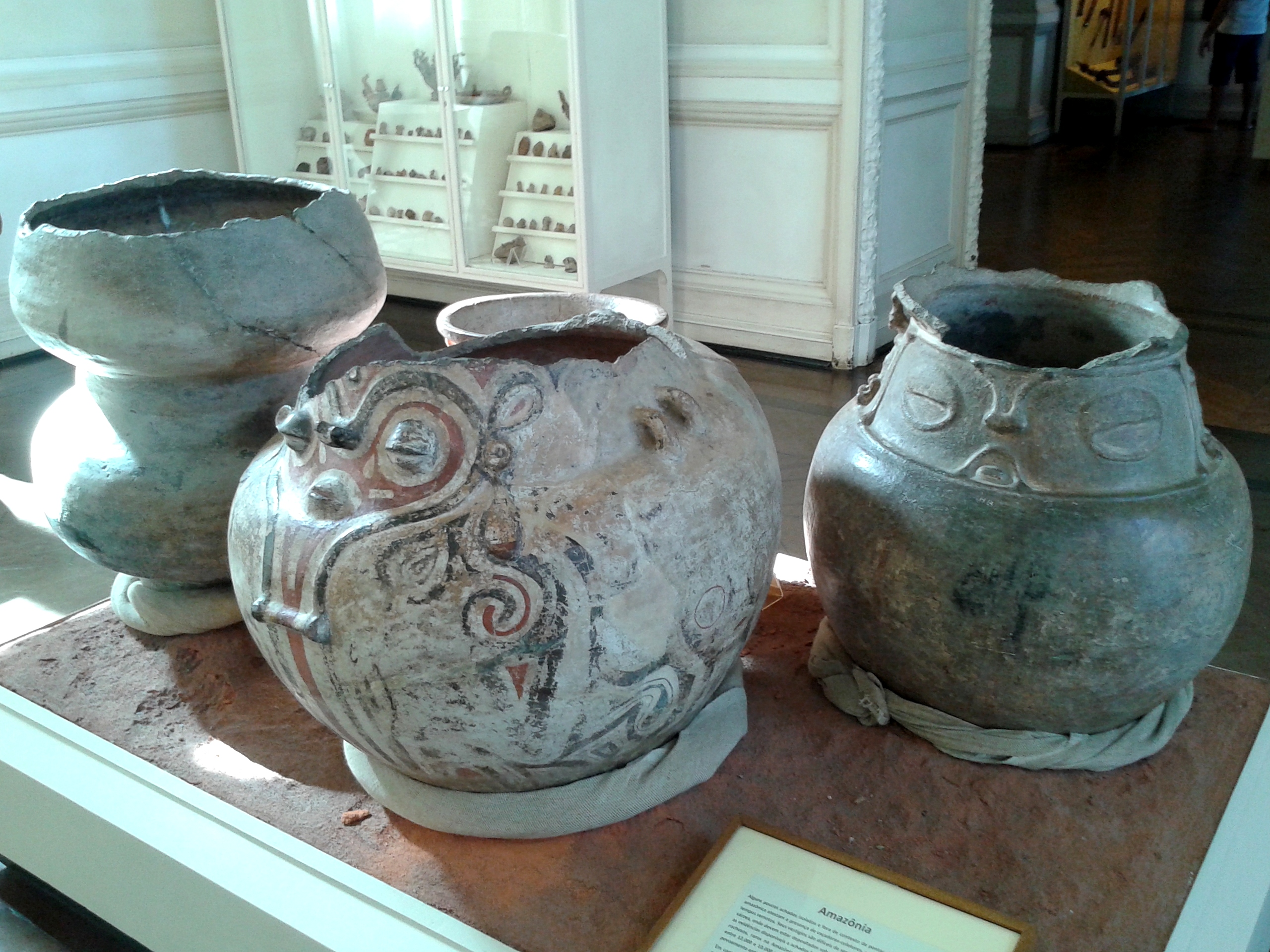 Português do Brasil: Cerâmicas amazônicas no acervo do Museu Nacional/UFRJ - Rio de Janeiro, Brasil.